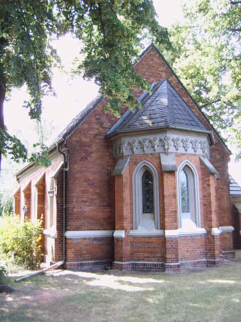 evangelische Kirche in Lübbenau-Neustadt Bild aufgenommen am 18.6.2006 von Olaf Meister